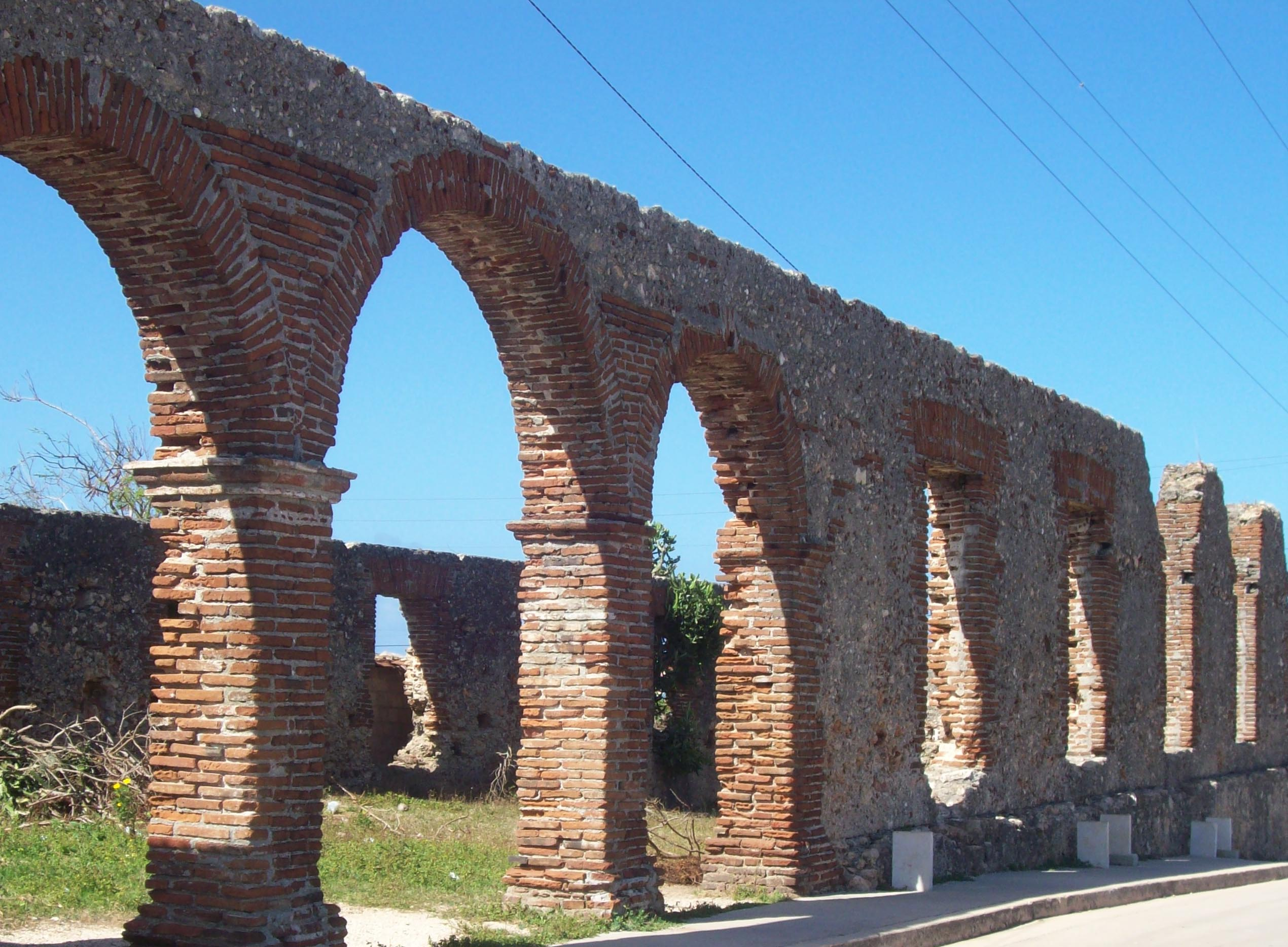 Ruinas de lo que fuera el sistema defensivo de Gibara durante el siglo XIX.